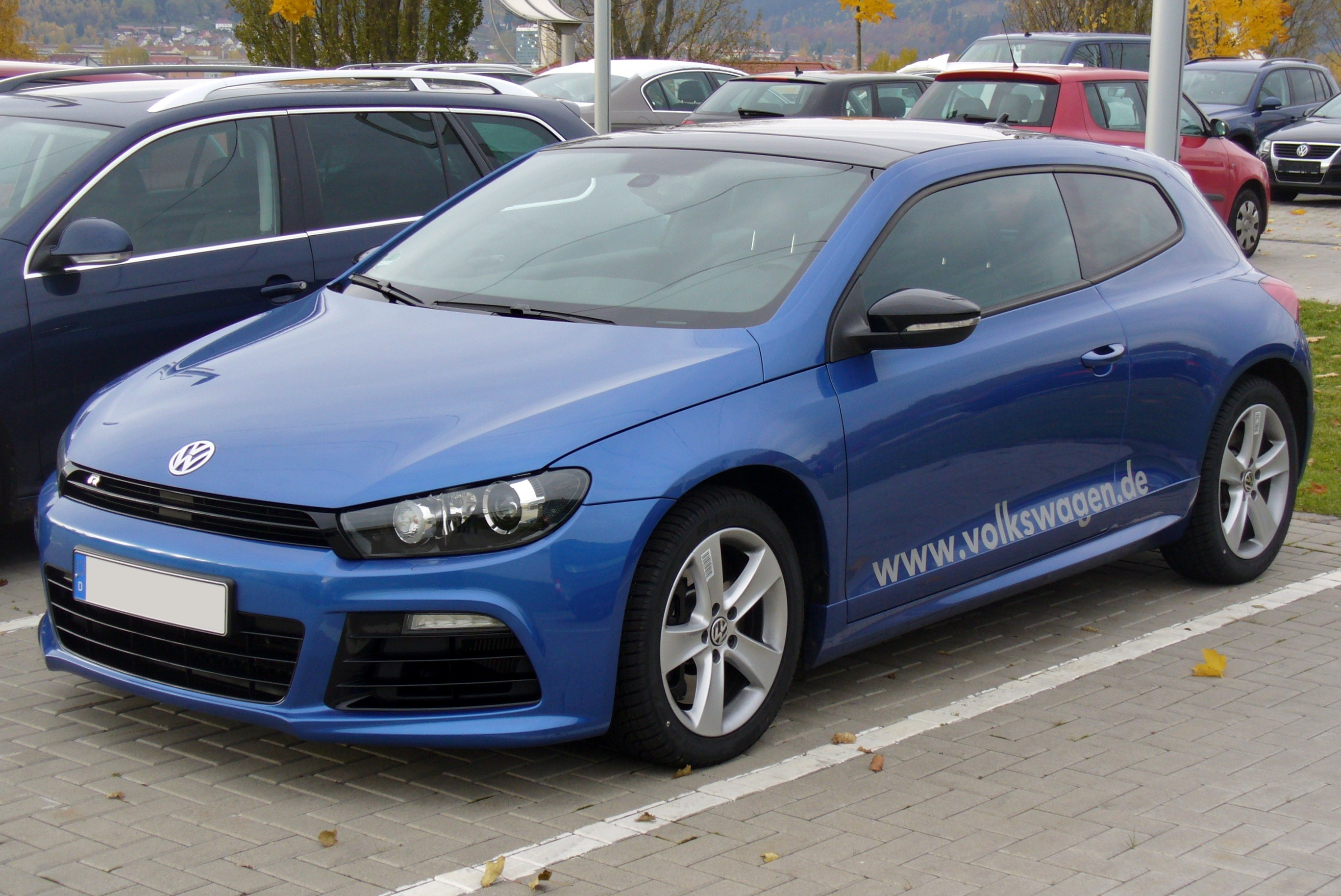 VW Scirocco R